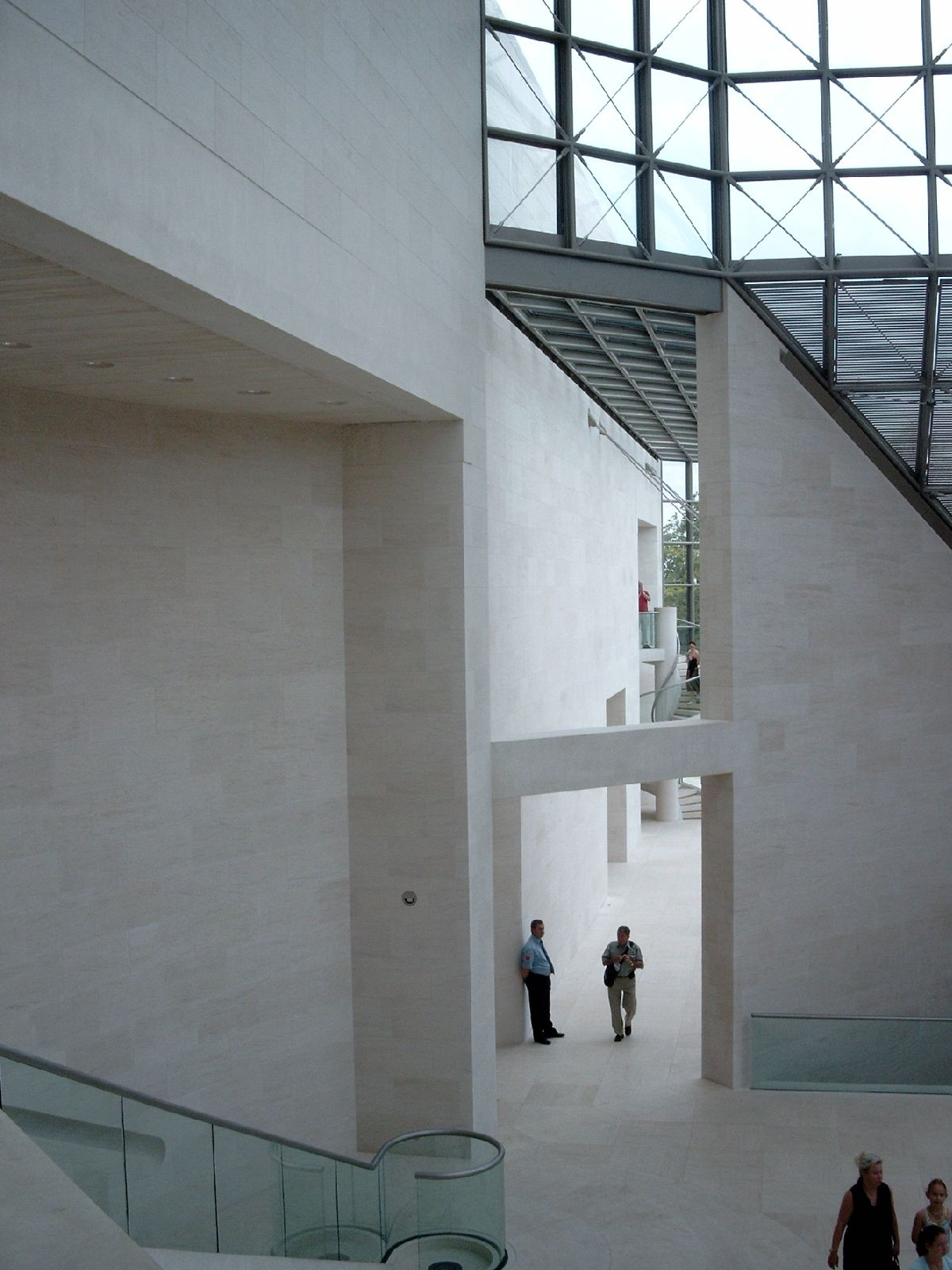 Binnenzicht MUDAM te Luxemburg